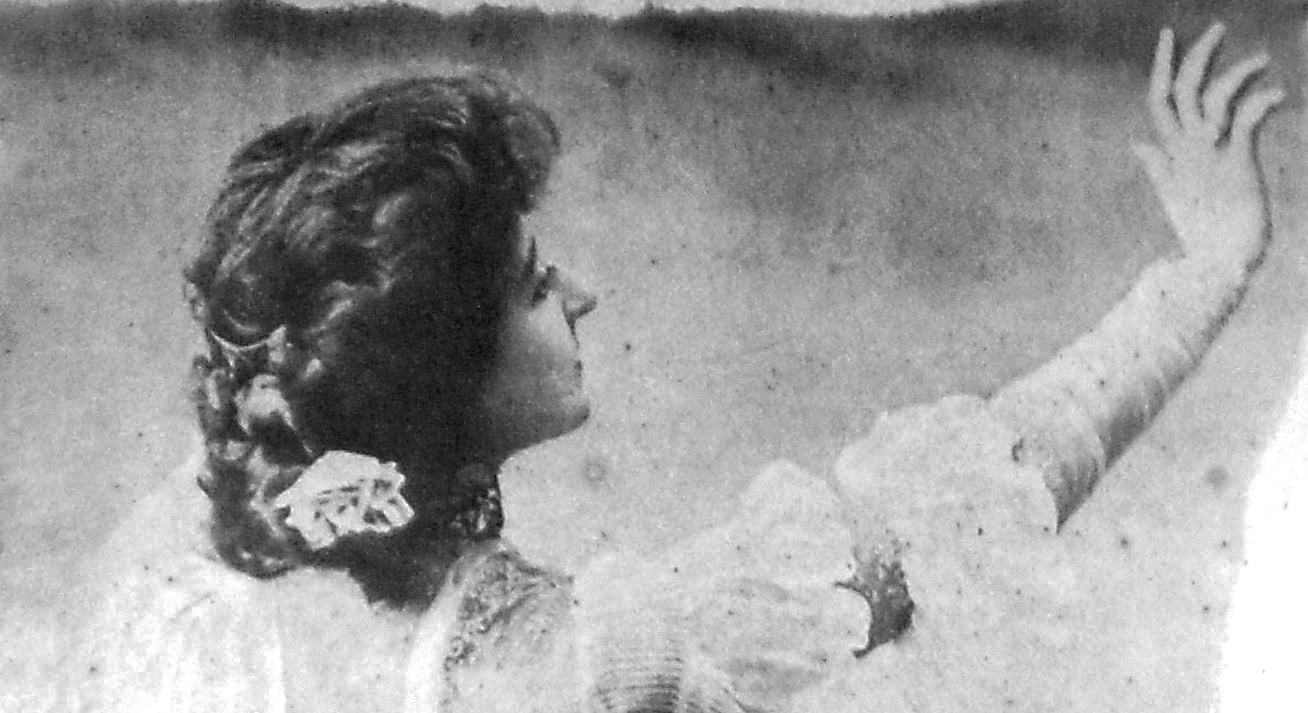 Eugenia Osterberger dirixindo unha obra, nunha foto publicada na portada da partitura de Insinuante.